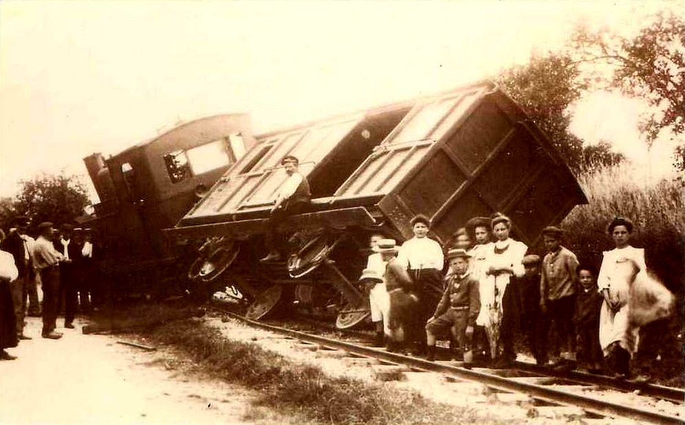 Le déraillement d'un train du tramway de Meaux à Dammartin le 23 juillet 1911.